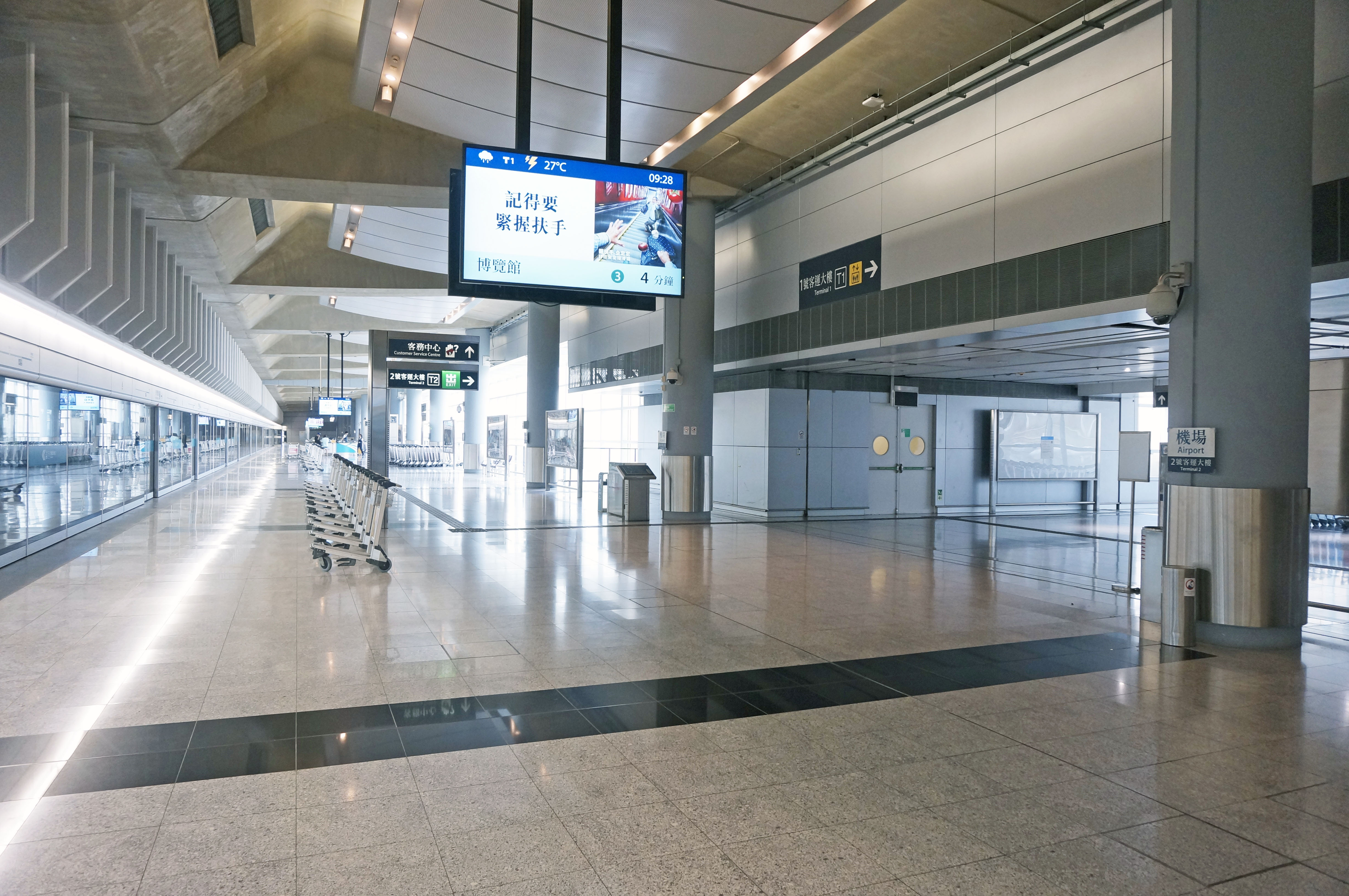 港鐵機場站月台